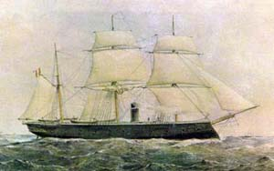 Fue el primer buque blindado de la Marina de Guerra del Perú. Pintura perteneciente a la Marina de Guerra del Perú que refleja el estado del blindado en 1866.